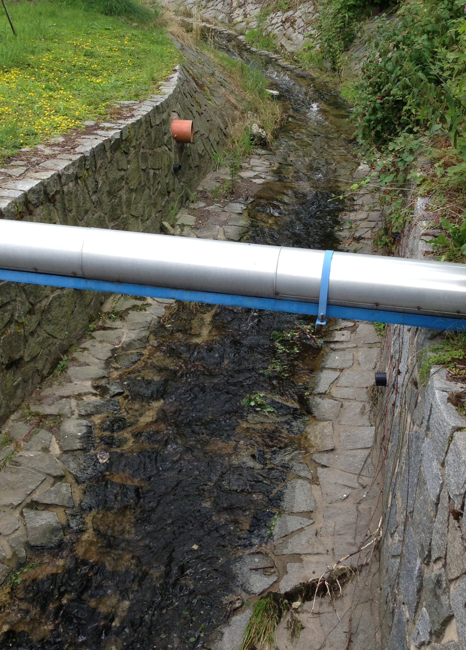 Petrovický potok v Petrovicích, okres Ústí nad Labem, při nízkém průtoku v červenci